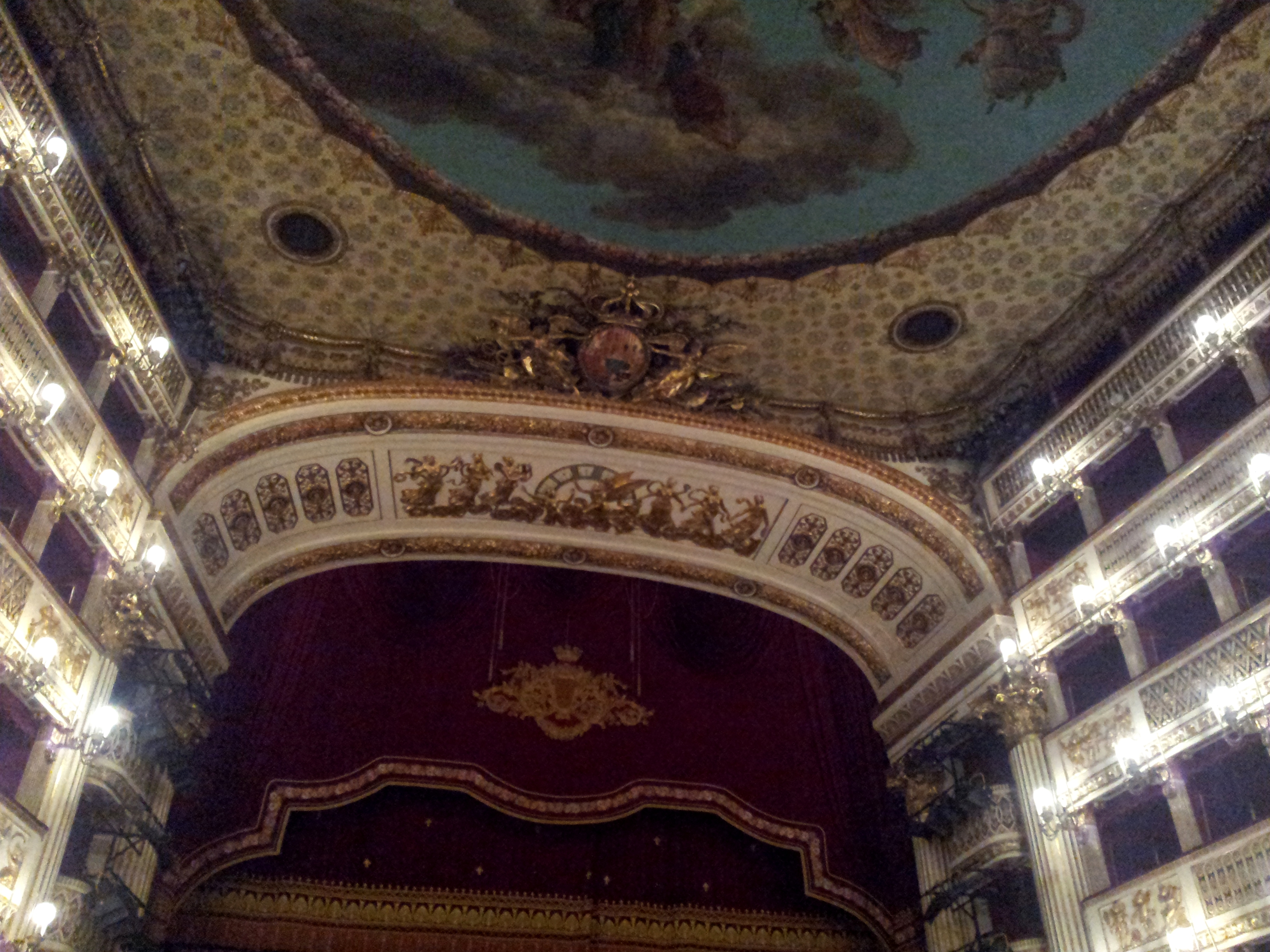 Dall'alto: 1) La grande tela sul soffitto del Real Teatro di San Carlo di Napoli. Apollo che presenta a Minerva i più grandi poeti del mondo, (1824 ca.). Opera di 500 metri quadrati di Antonio, Giovanni e Giuseppe Cammarano. 2) Lo stemma delle Due Sicilie 3) L'orologio del sottarco di Camillo Guerra e Gennaro Maldarelli. (1816). Il tempo indica lo scorrere delle ore mentre la sirena delle arti, con le braccia aperte, tenta di trattenerle. Come a dire: l'arte non ha tempo. 4) Il doppio sipario del Real Teatro di San Carlo (Napoli). In quello posteriore (nell'immagine, elevato e dunque nascosto), vi è il dipinto dell' Omero e le Muse tra i poeti, opera del 1854 di Giuseppe Mancinelli e Salvatore Fergola.